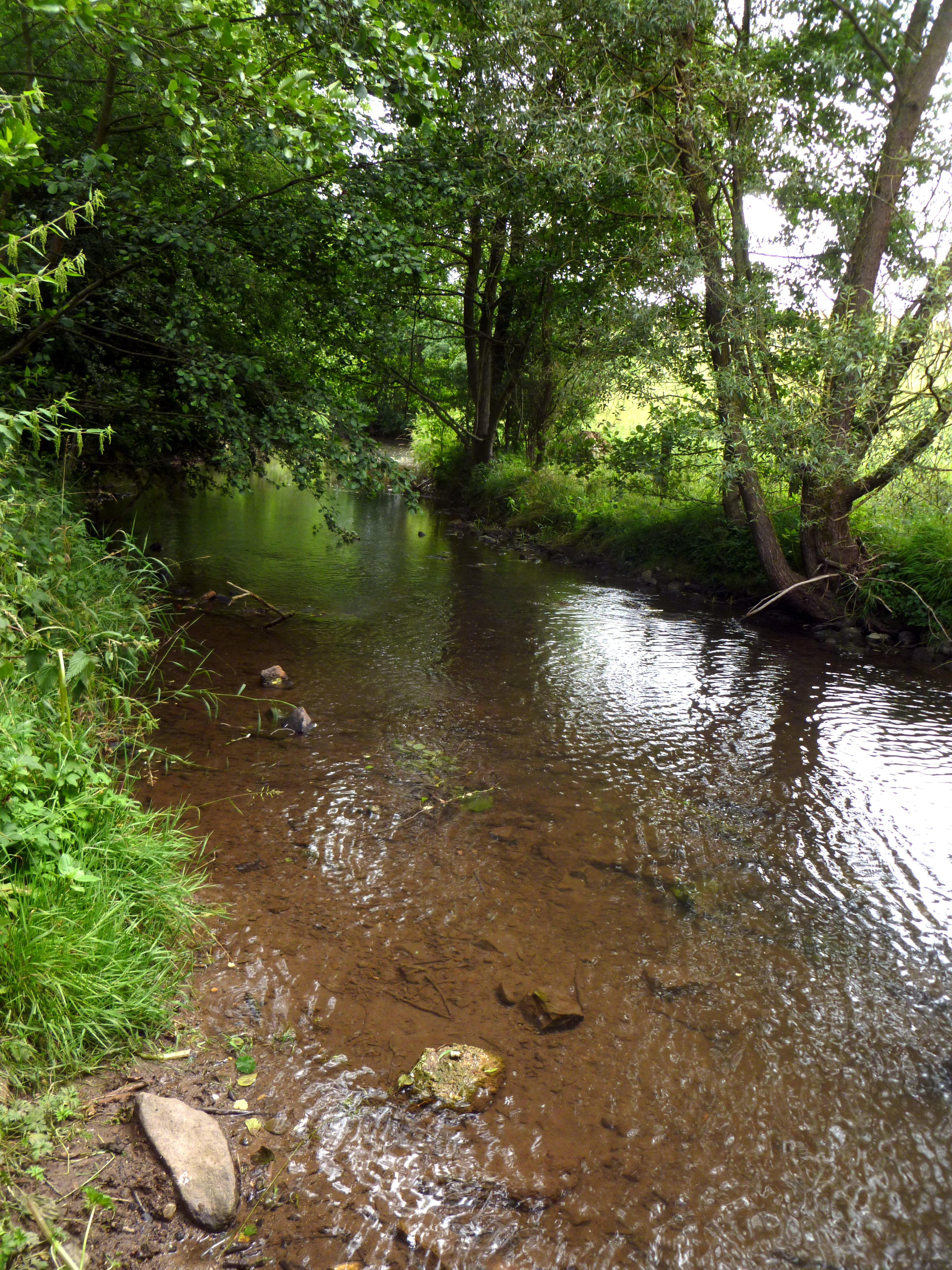 Rollefbach bei Aachen-Brand